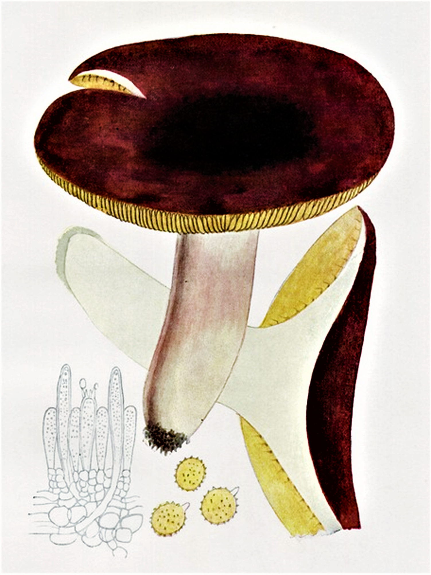 Giacomo Bresadola: Russula alutacea f. vinoso-brunnea (Pers., 1801) Bres. (1929), heute Russula alutacea (Pers.) Fr. (1838)